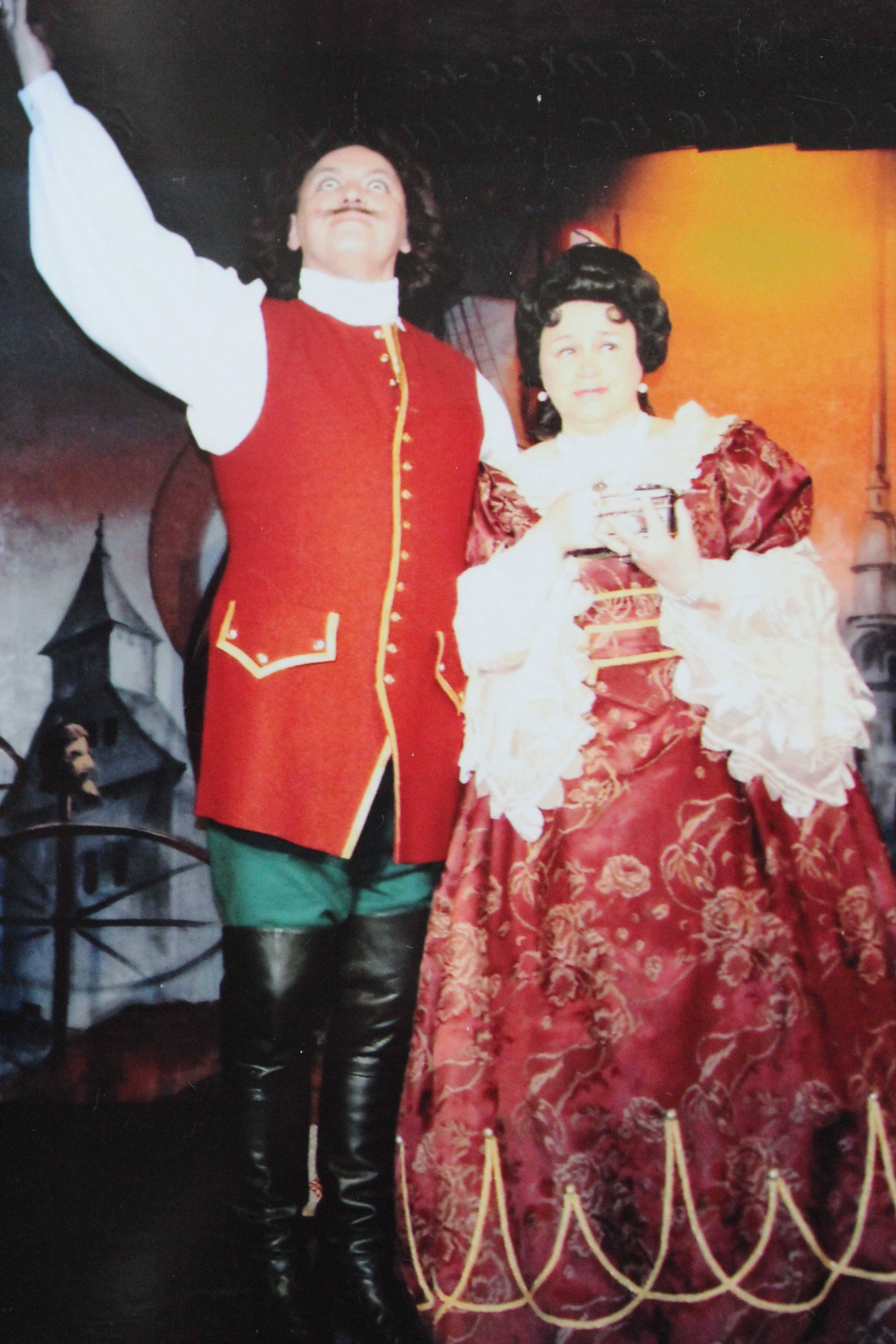 Сцена из спектакля «Смерть и любовь. Женщины Петра Великого» Санкт-Петербургского драматического театра «Патриот» РОСТО. В роли Петра Великого Геннадий Егоров, в роли Екатерины Первой Татьяна Кудрявцева. Режиссёр-постановщик Геннадий Егоров.